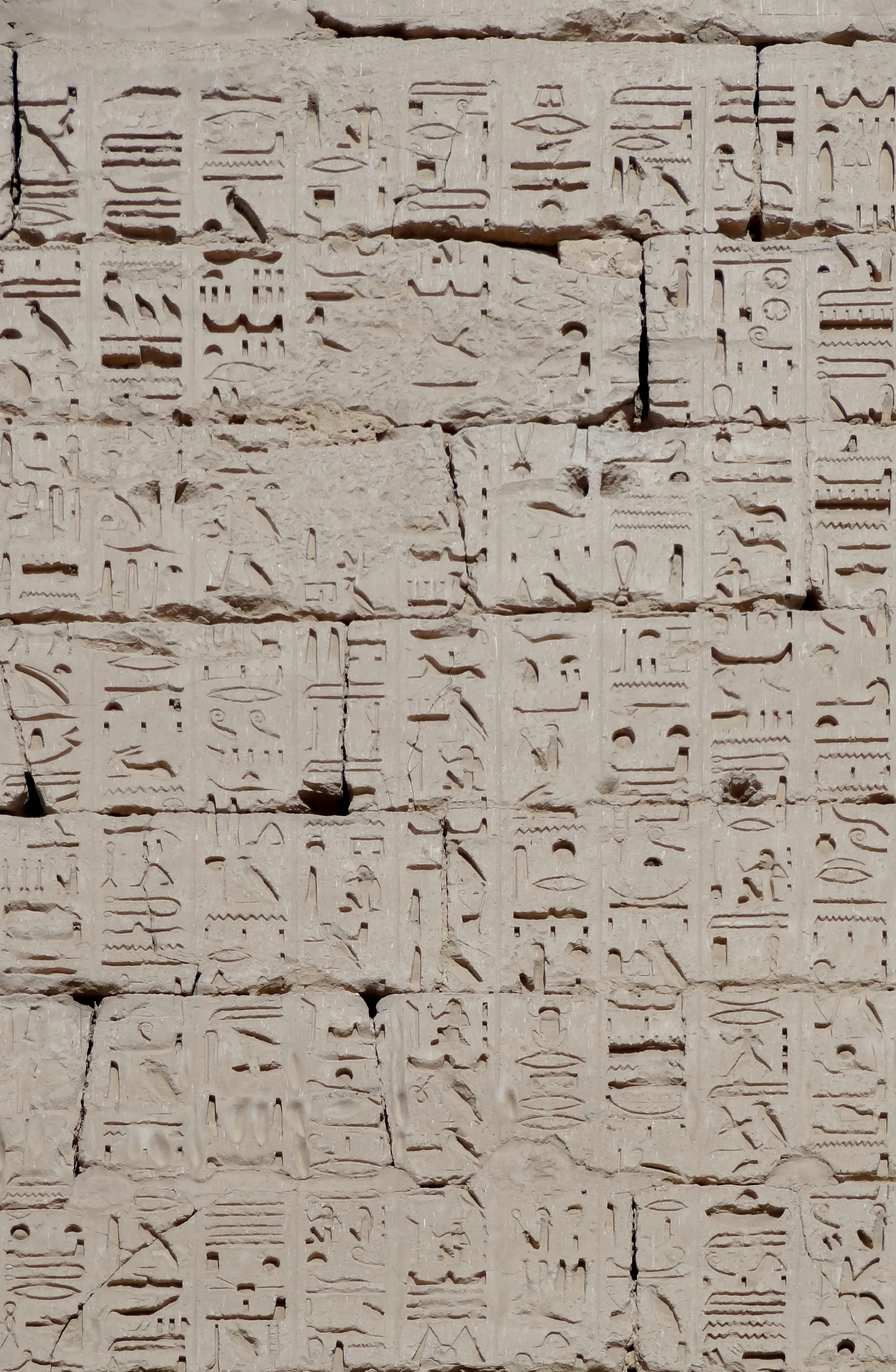 Relief mit den Hieroglyphen der Seevölker im ersten Innenhof am zweiten Pylon des Totentempels Ramses’ III. in Medinet Habu, Ägypten